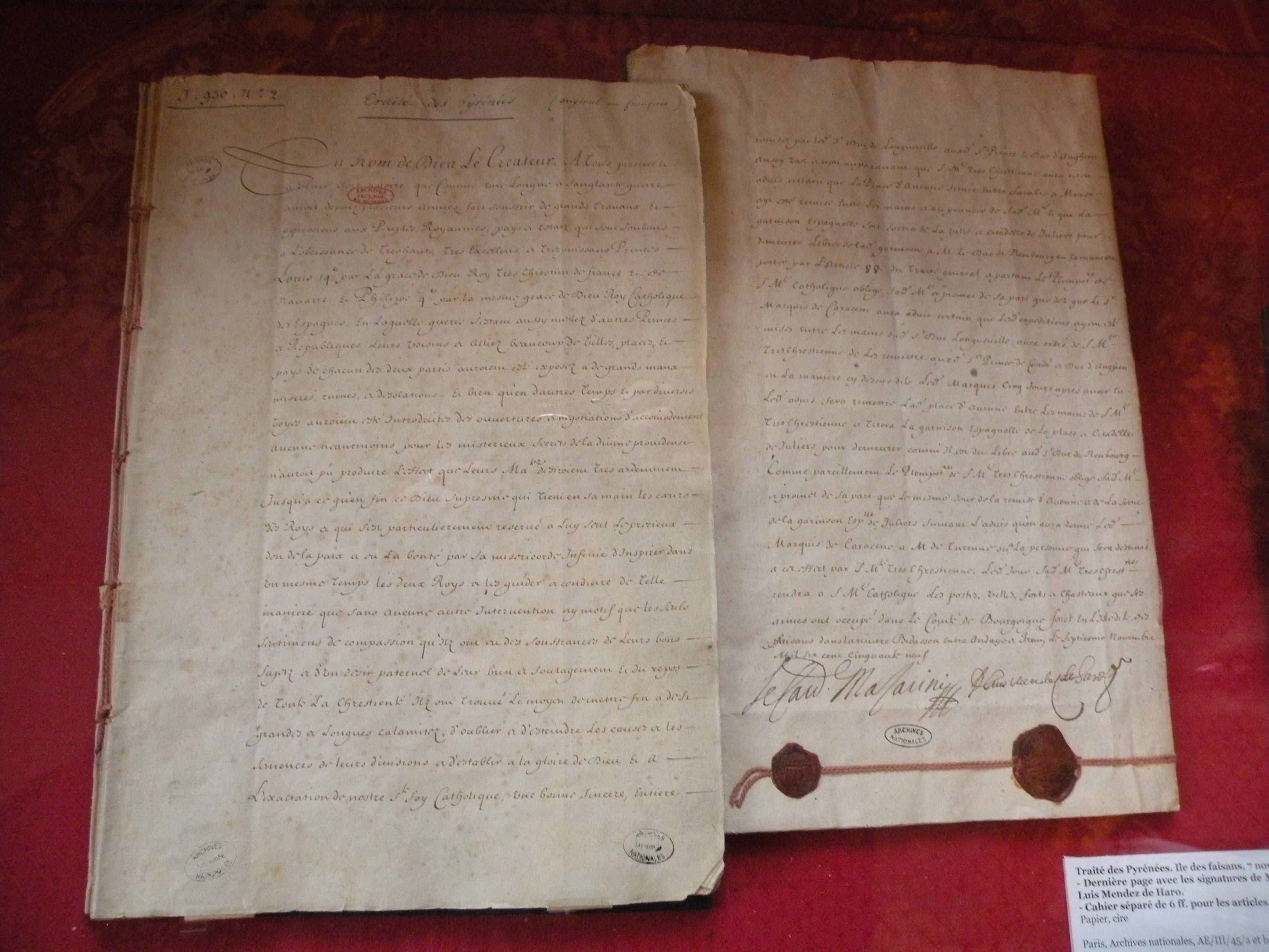 Traité des Pyrénées signé par le cardinal Mazarin et Luis de Haro au nom de leurs souverains respectifs et mettant fin à la guerre entre la France et l'Espagne, première et dernière pages (Musée des Archives nationales, Hôtel de Soubise)